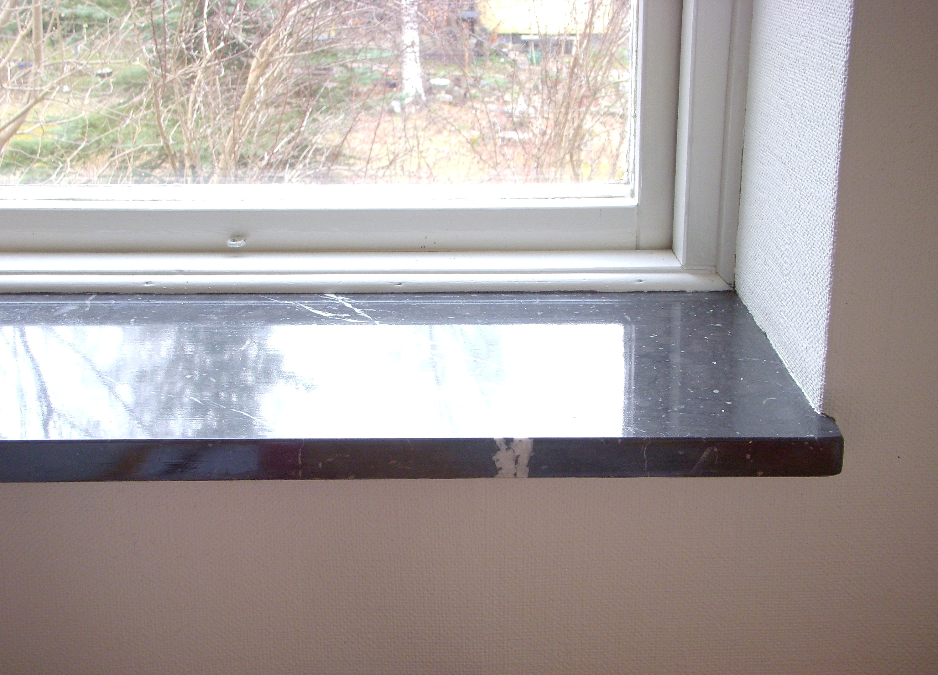 Exempel för en inbyggd fönsterbänk